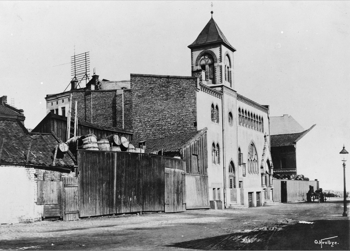 Vaterland småkirke. Revet 1959. Arkitekt Heinrich Jürgensen.